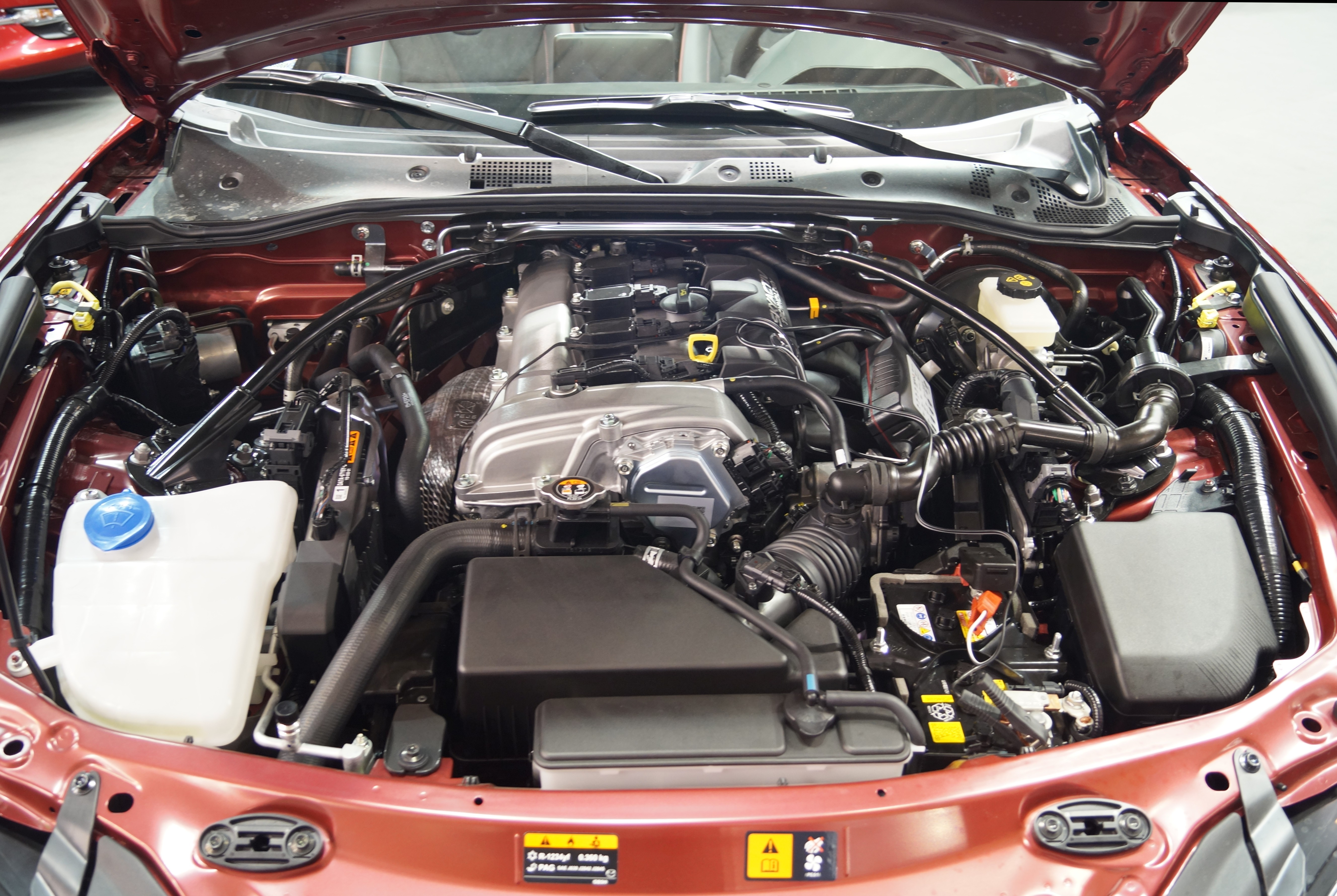 Silnik 2.0 SkyActive-G w Maździe MX-5 na Motor Show Poznań 2017.